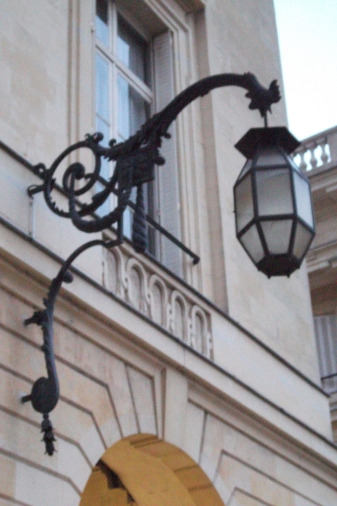 ferronnerie en forme de coq des Lampes_de_la_place_royale de Reims sur une esquisse du XVIIIe siècle.